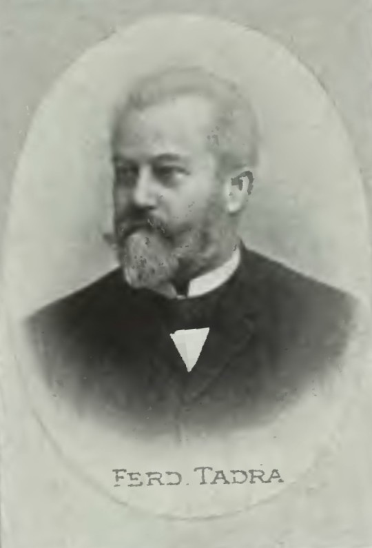 Portrét – Ferdinand Tadra (1844-1910), Český historik.